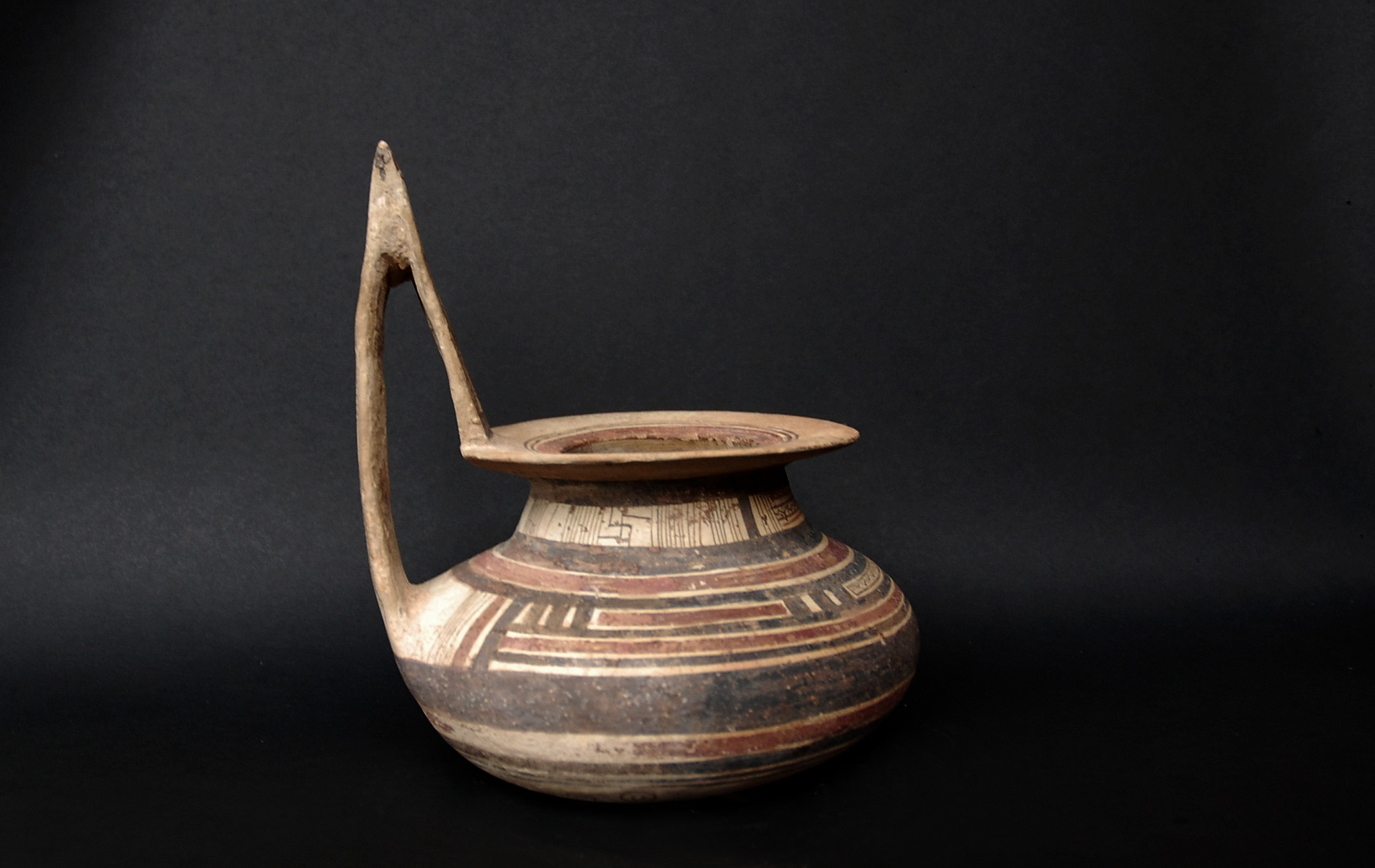 Kyathos daunien, Vème siècle avant notre ère